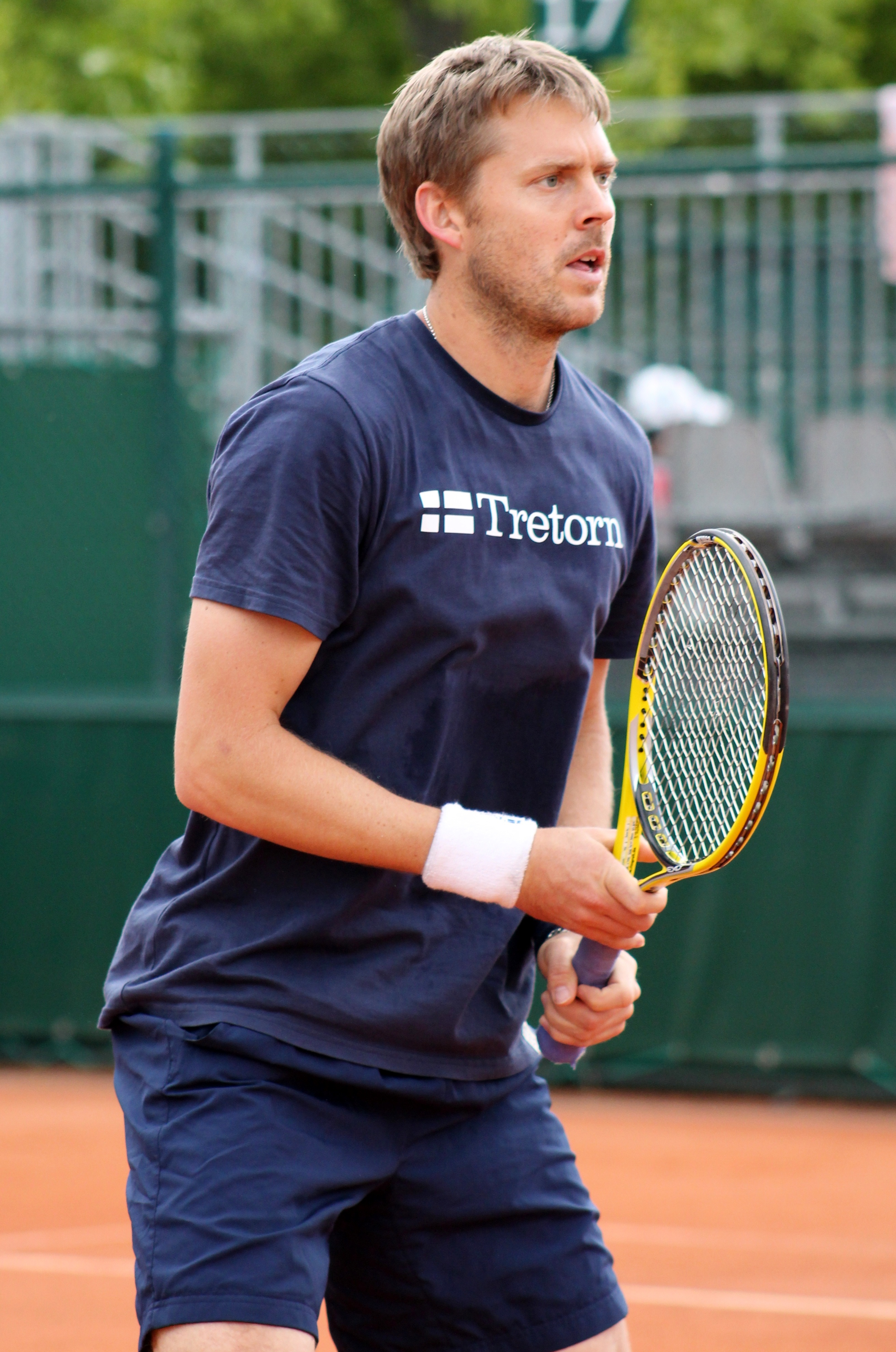 Johan Brunstrom